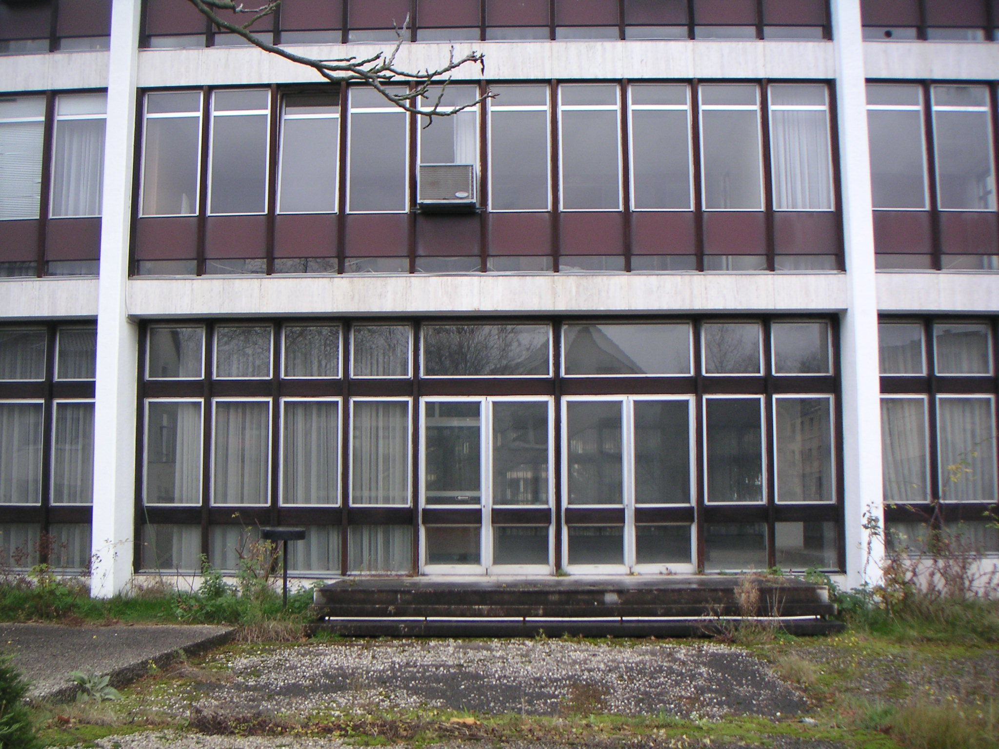 Ehemalige türkische Botschaft in Bonn-Mehlem, Utestraße 47/ Gernotstraße 5: Kanzleigebäude (2012 Verkauf und Abriss und später Bau von Eigentumswohnungen auf dem Grundstück)